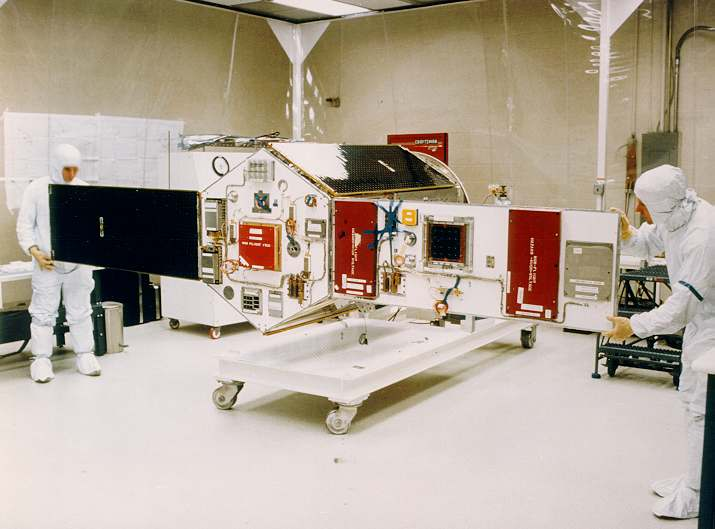 Advanced Photovoltaic and Electronics Experiment (APEX) Satellite